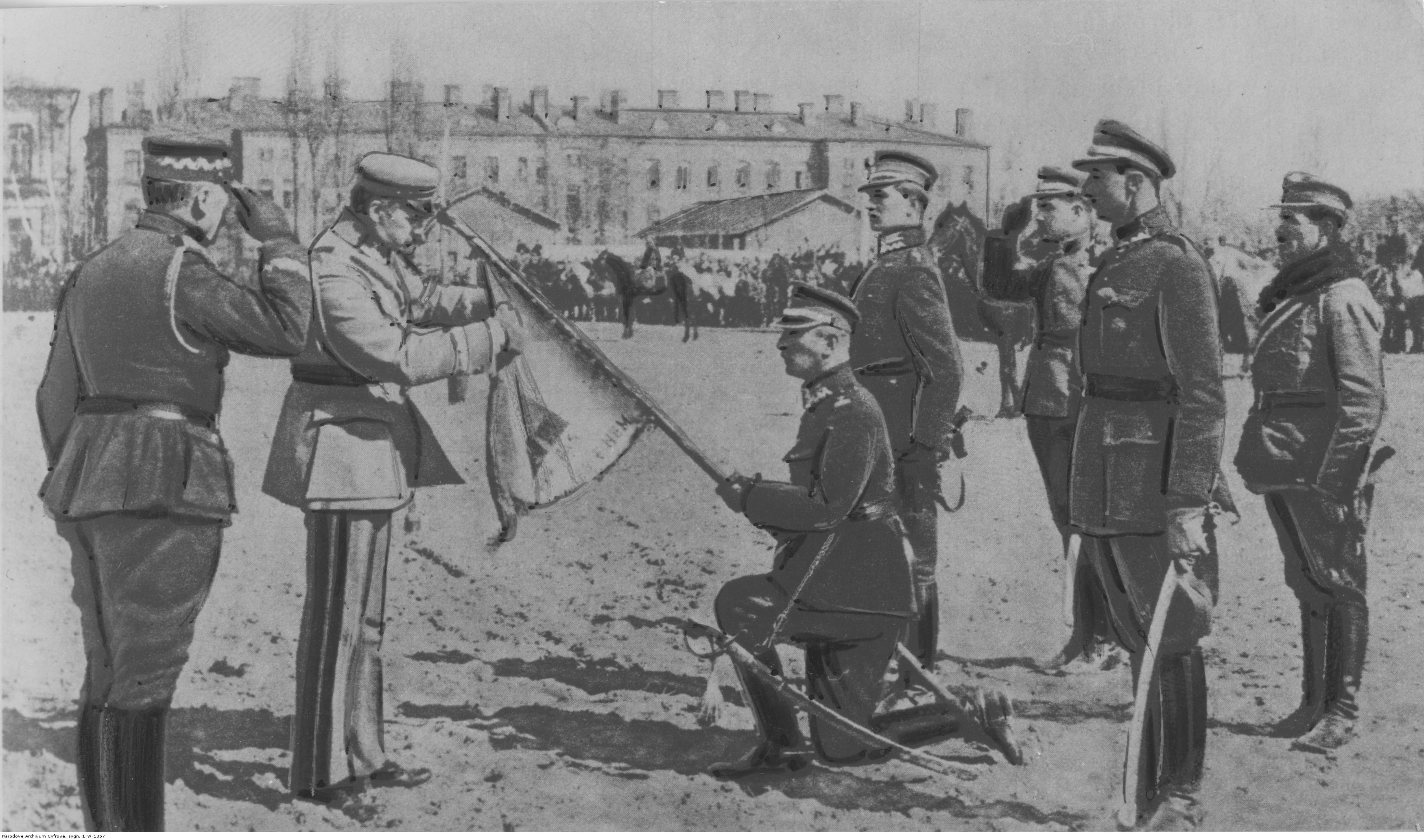 Marszałek Józef Piłsudski dekoruje sztandar 1 Pułku Szwoleżerów w Chełmie orderem Virtuti Militari. Klęczy dowódca pułku płk. Jan Głogowski.